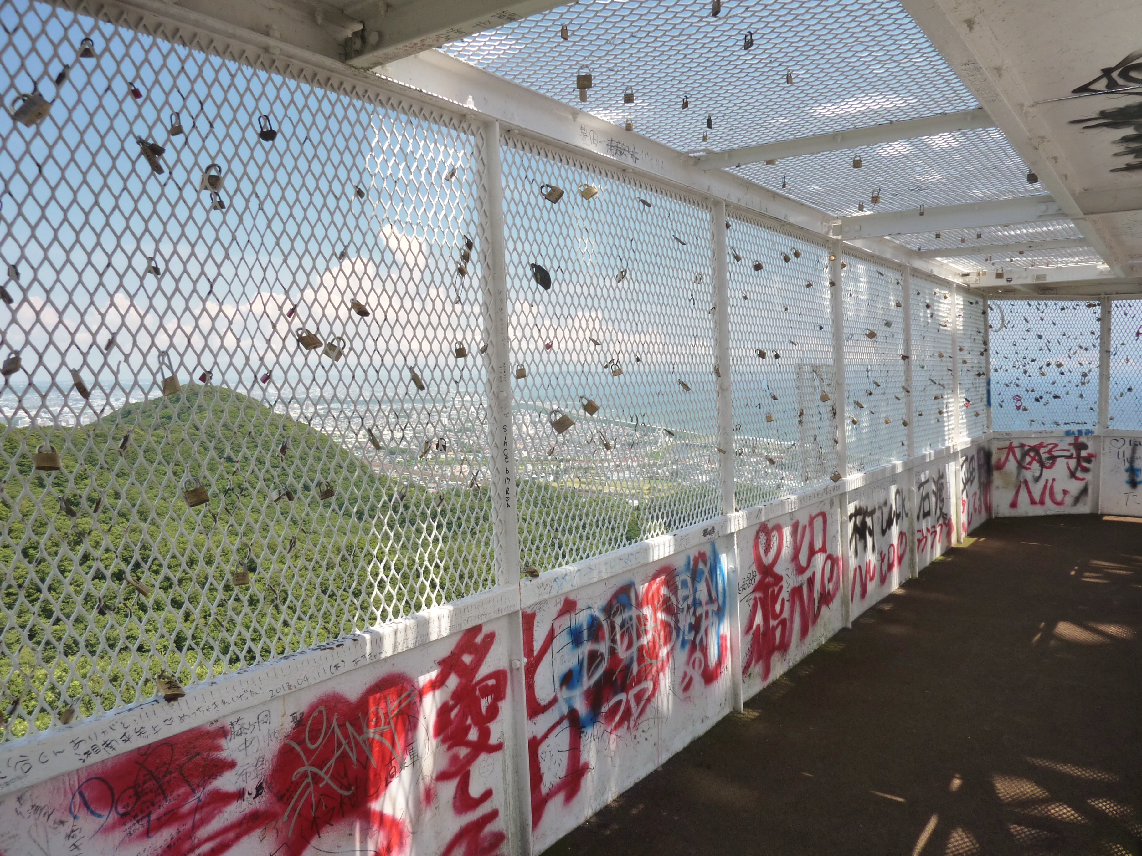 神奈川県平塚市・大磯町。湘南平のテレビ塔展望台上段の様子。